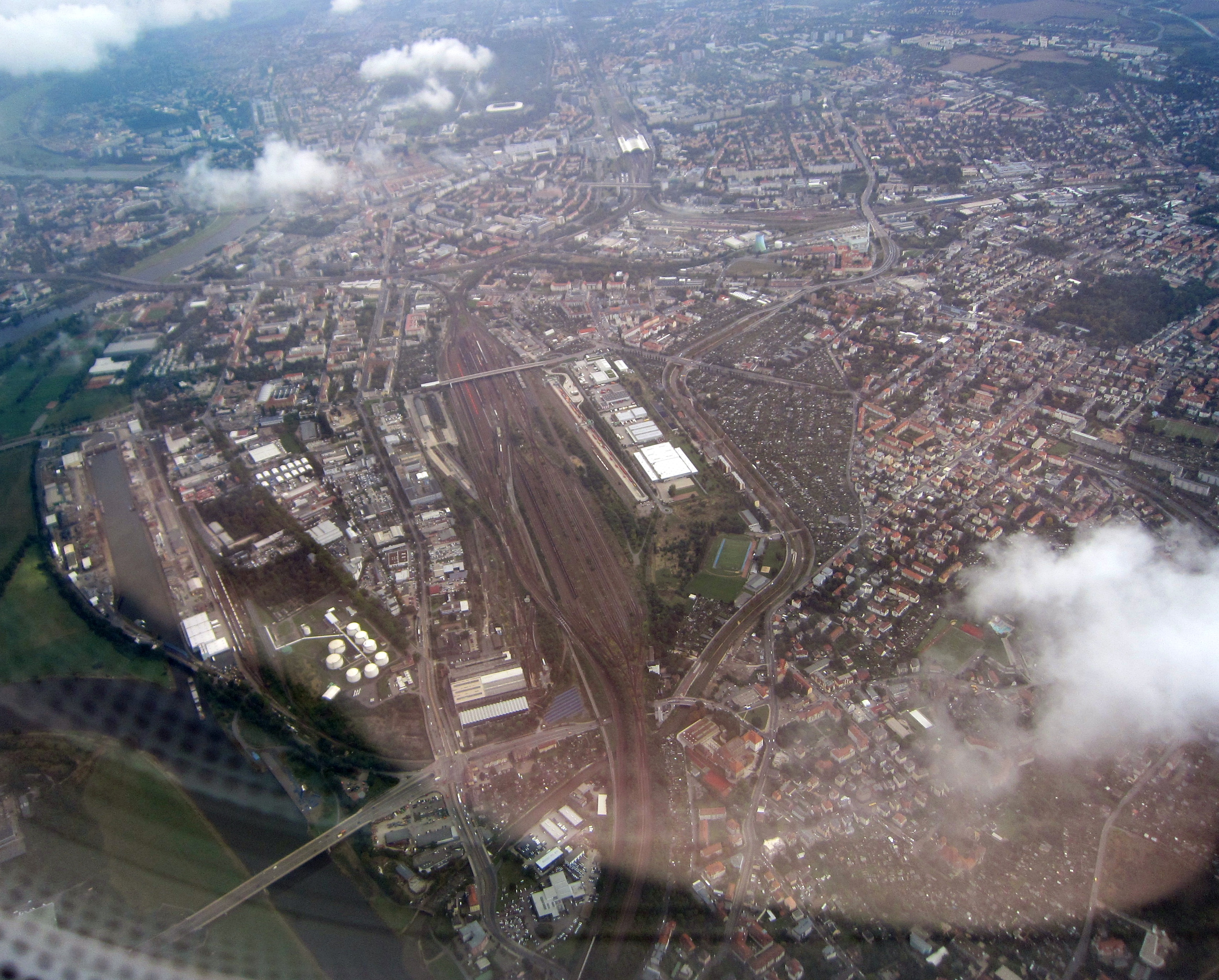 Der Alberthafen (links) und der Bahnhof Friedrichstadt (mitte)